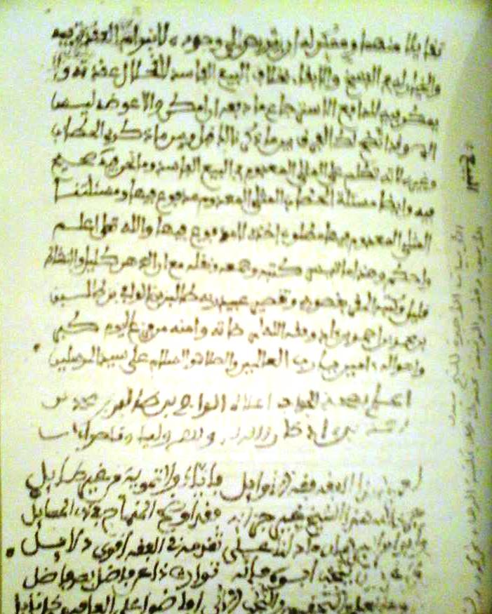 مخطوط يعود للقرن 11 هــ لأبيات بخط يد الشيخ سيد الامين هذه الوثيقة محفوظة مكتبة البرهان لمحمد محمود بن الشيخ الأرواني